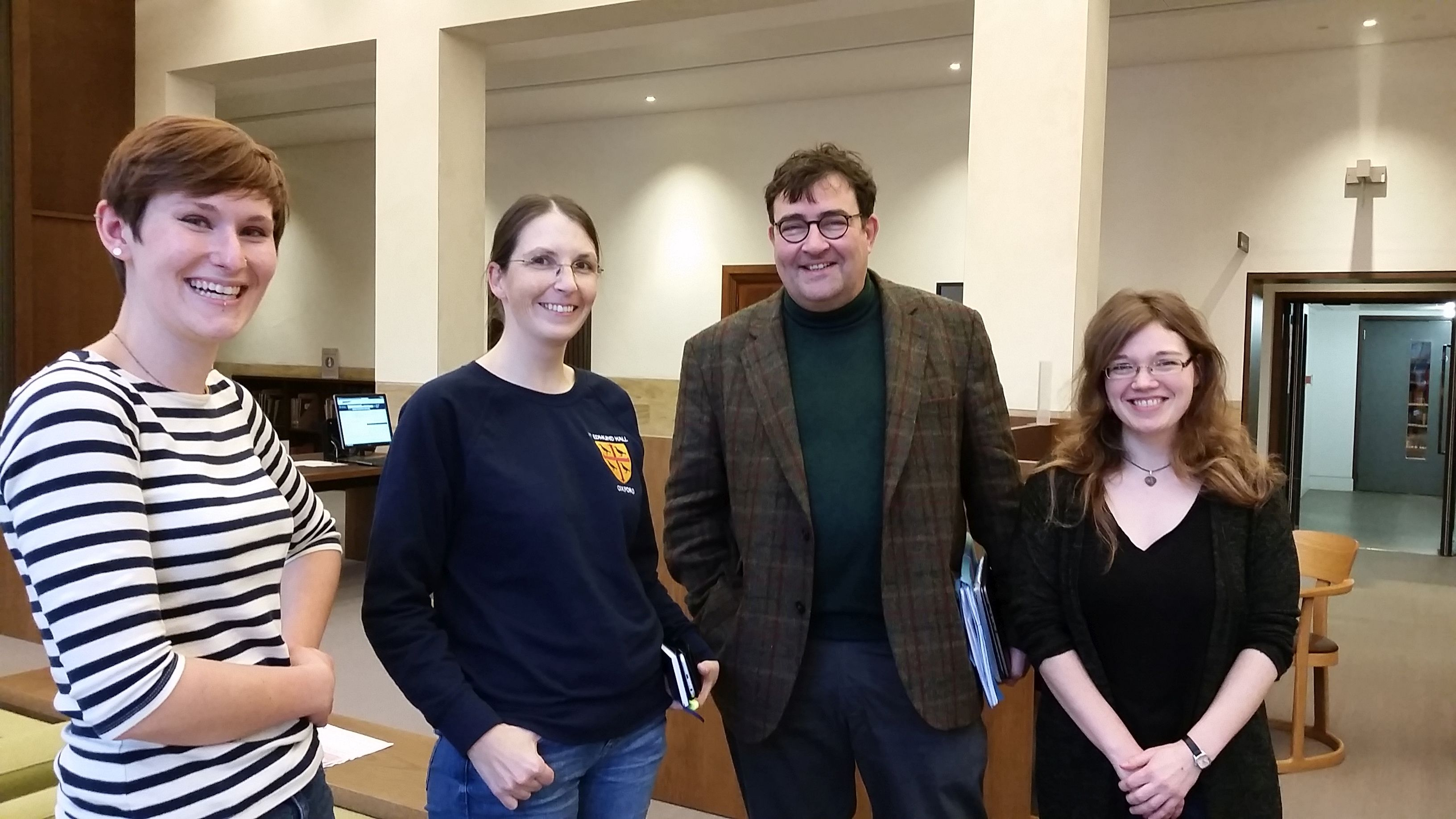 Der Kirchenhistoriker Thomas Kaufmann während eines Workshops zu Frühdrucken in der Bodleian Library, Oxford, im Rahmen des Reformationsjubiläums, mit einer Gruppe von Germanistinnen